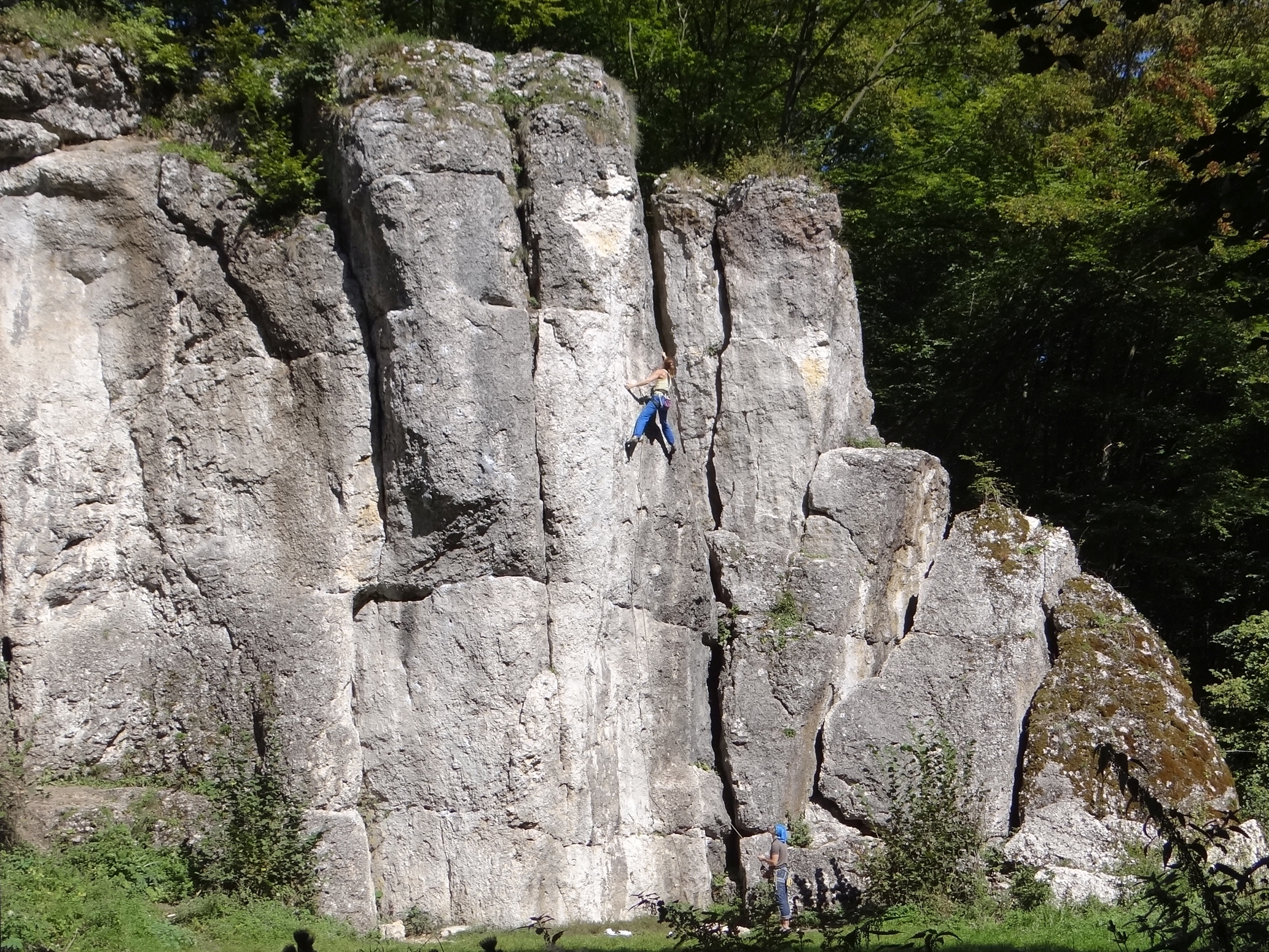 Dupa Słonia w Dolinie Będkowskiej